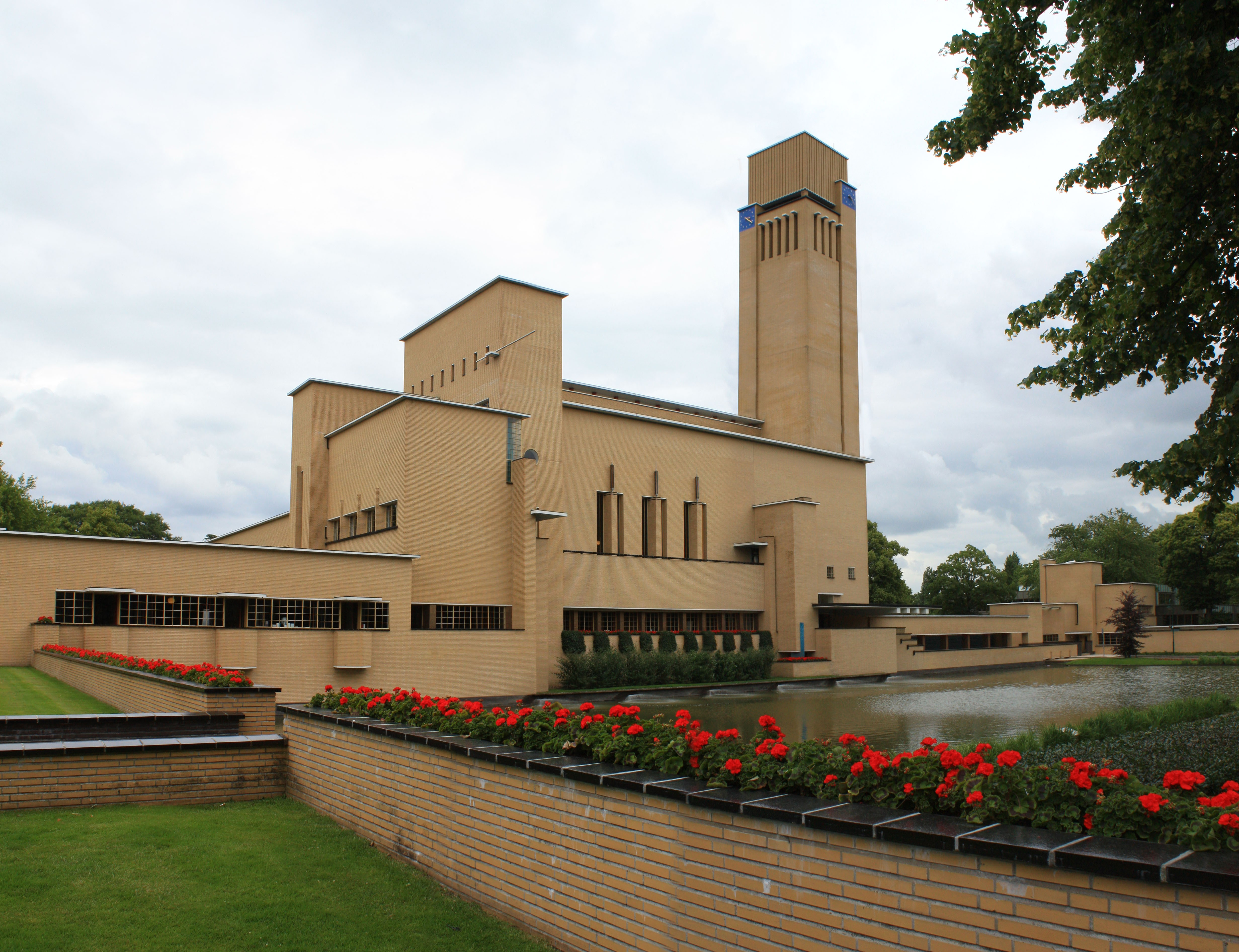 Het Raadhuis van Hilversum